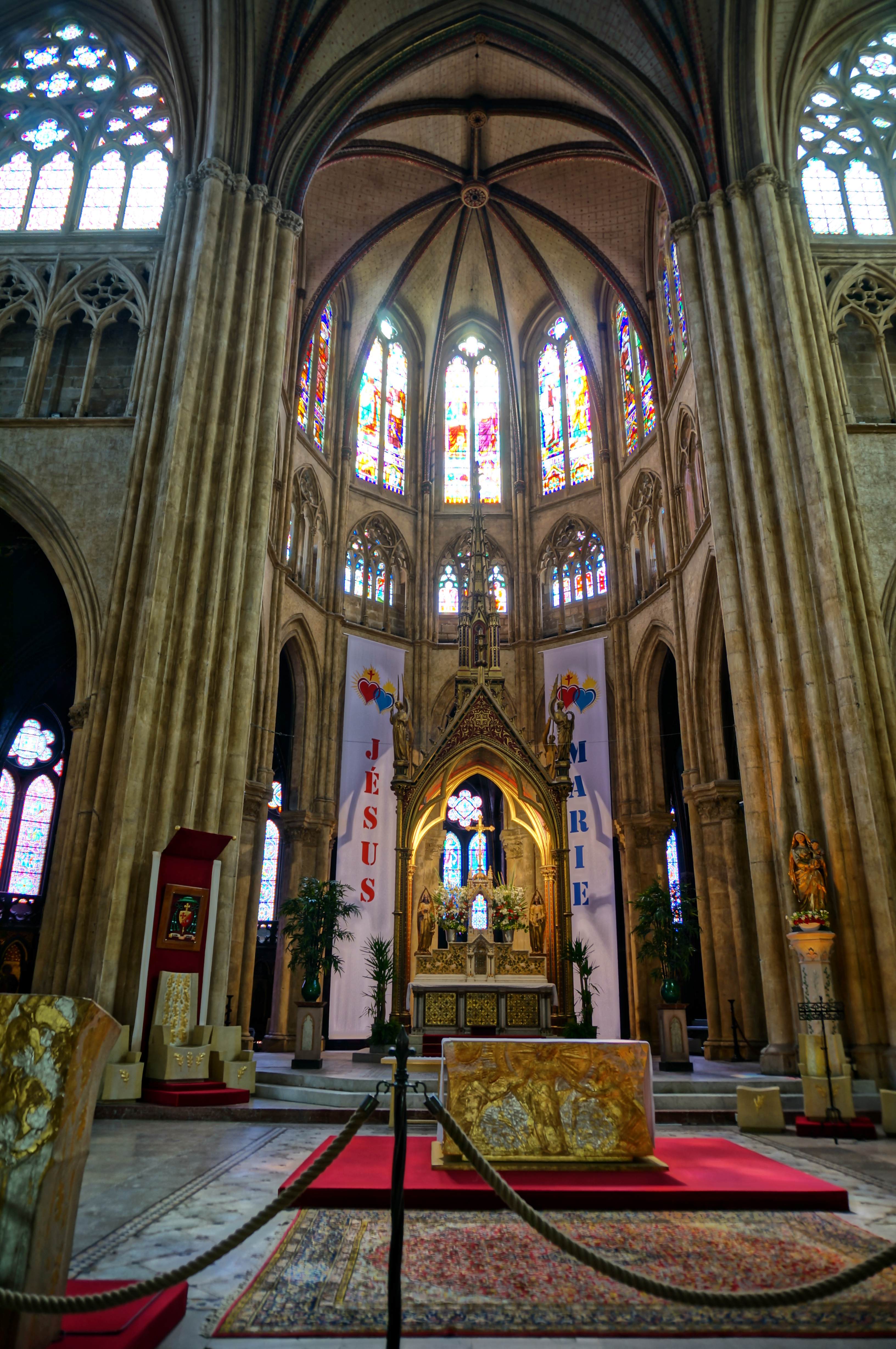 Cathédrale Sainte-Marie de Bayonne